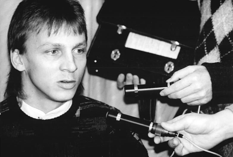 ADN-ZB-Grimm-16.12.89-fd- Berlin: Thom-Transfer- Der erste qualifizierte Transfer eines DDR-Fußballers ist perfekt: Andreas Thom, 24jähriger Nationalspieler des BFC Dynamo, wird ab 1. Februar 1990 für den BRD-Bundesligisten Bayer 04 Leverkusen stürmen. Wie auf einer Pressekonferenz mitgeteilt wurde, ist der entscheidende Vertrag von den beiden beteiligten Klubs bereits am 12. Dezember unterzeichnet worden.